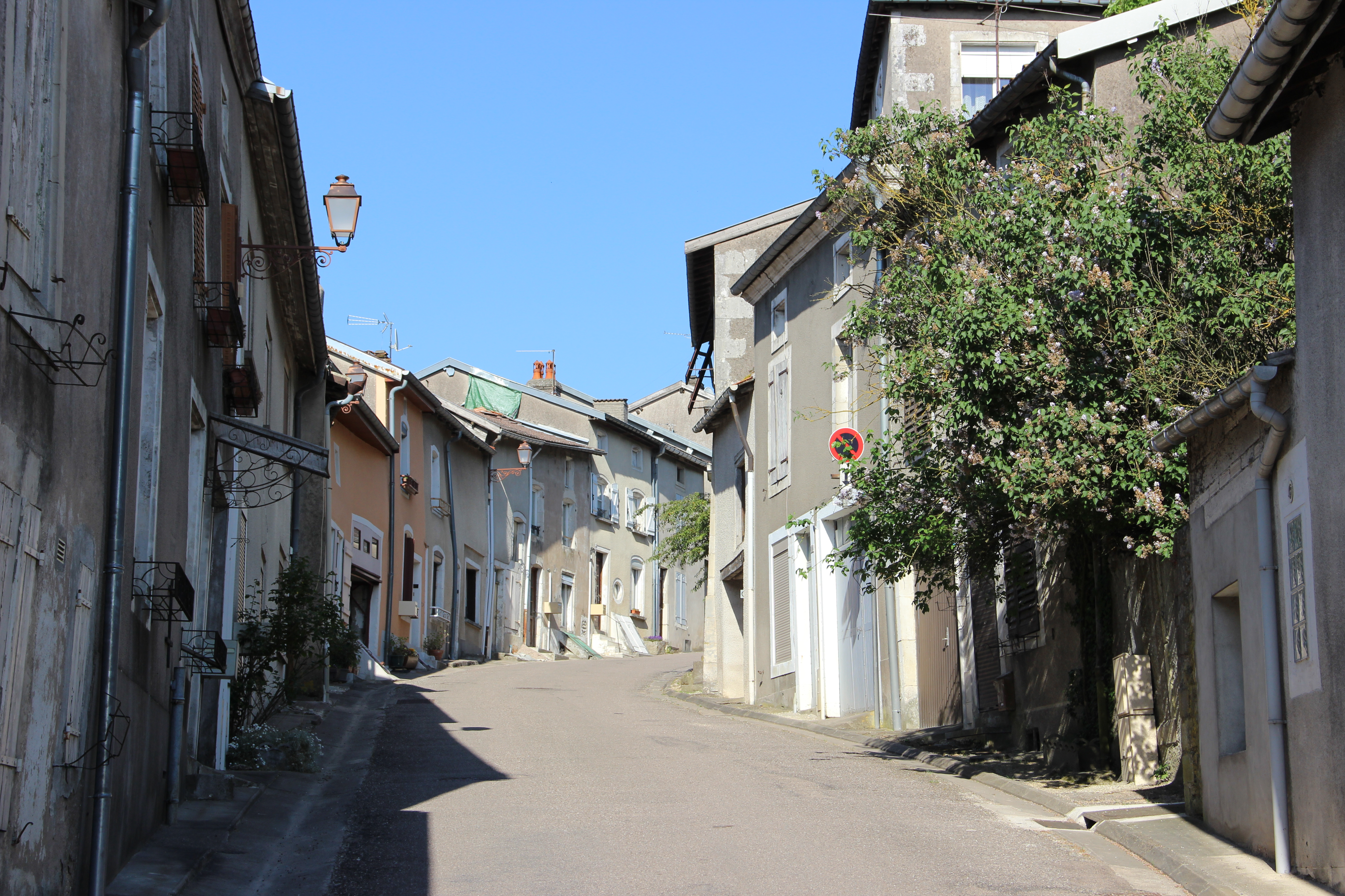 Rue Haute